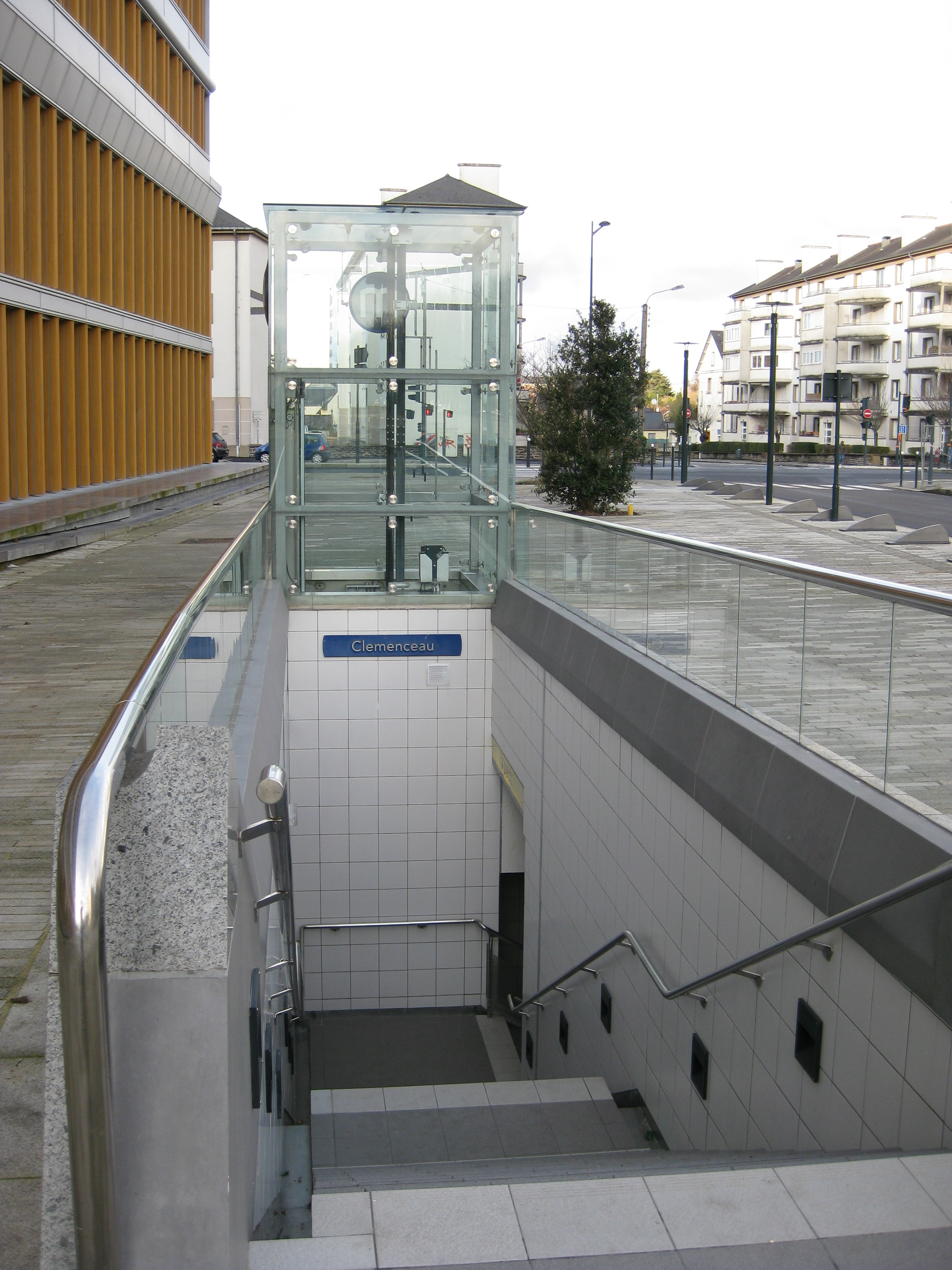 Entrée Station Métro Clemenceau Rennes